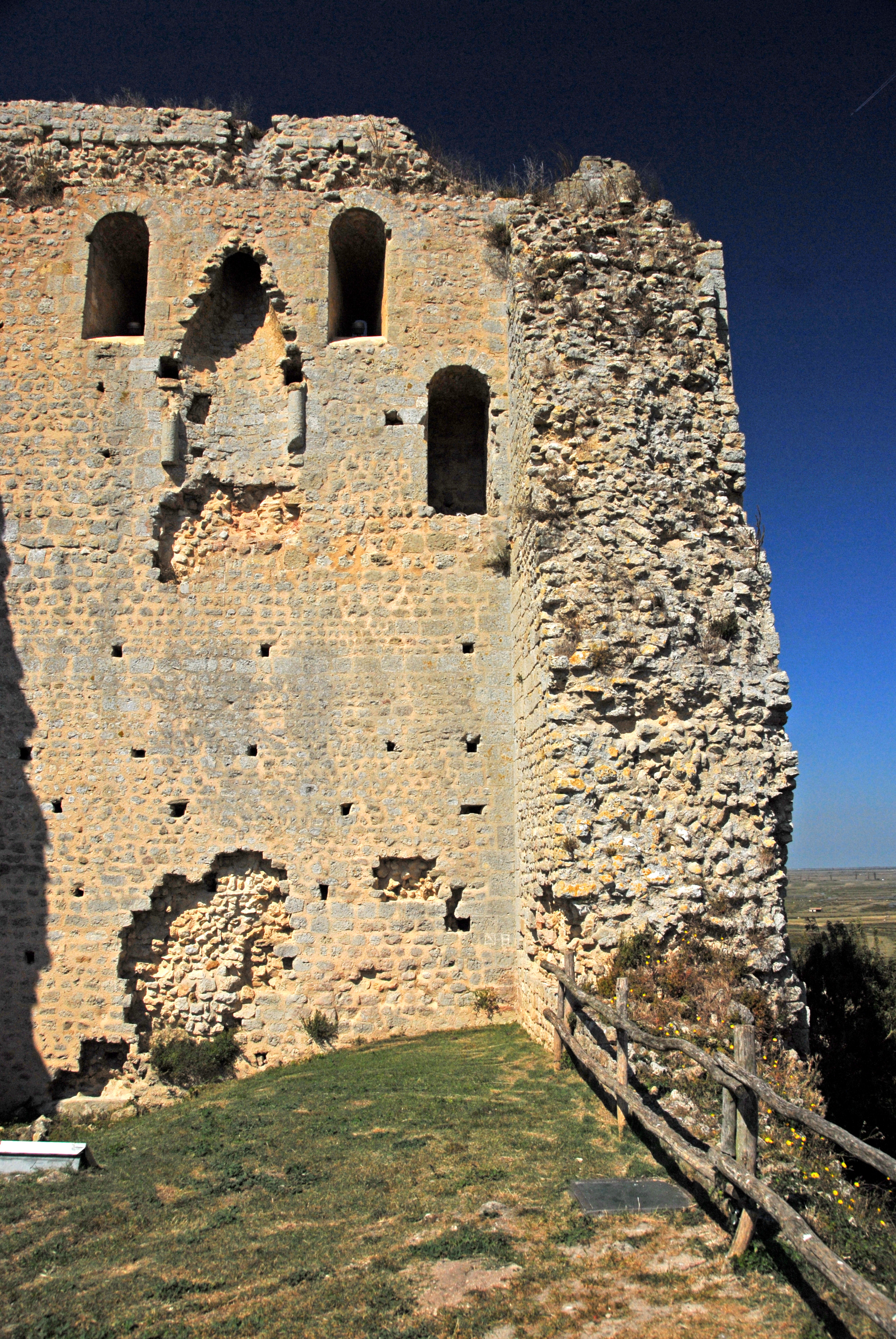 Tour-de-Broe, Westwand von innen